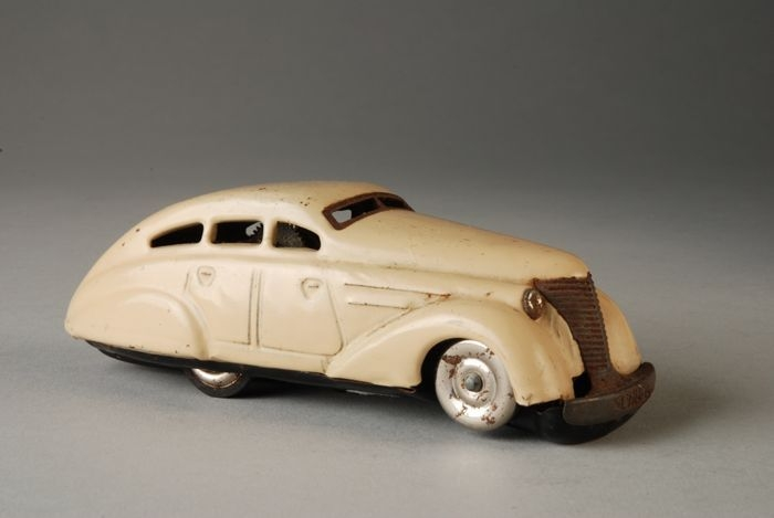 Crèmekleurige Schuco opwindauto, model Patent-Auto of “Wendeauto” 1010, ook omkeerauto genoemd.De auto moest met een sleutel worden opgewonden en kon op elk glad oppervlak rijden zonder ervan af te vallen (de zogenaamde turn-back feauture).